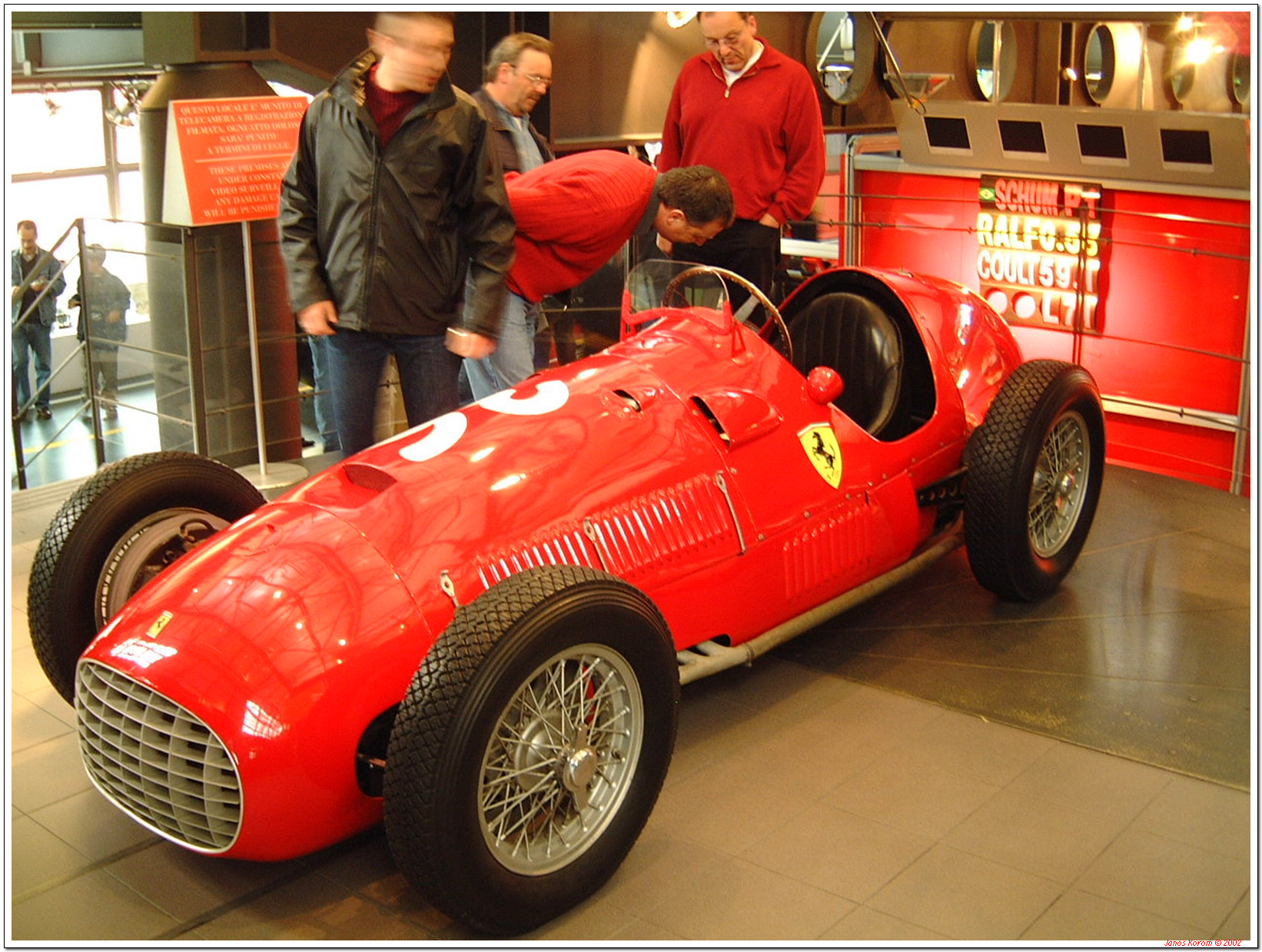 Galleria Ferrari (12)